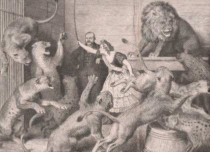 Dampteurin in "Kreutzbergs Menagerie". Stich nach einer Zeichnung von H. Leutemann (Ausschnitt) Privatsammlung